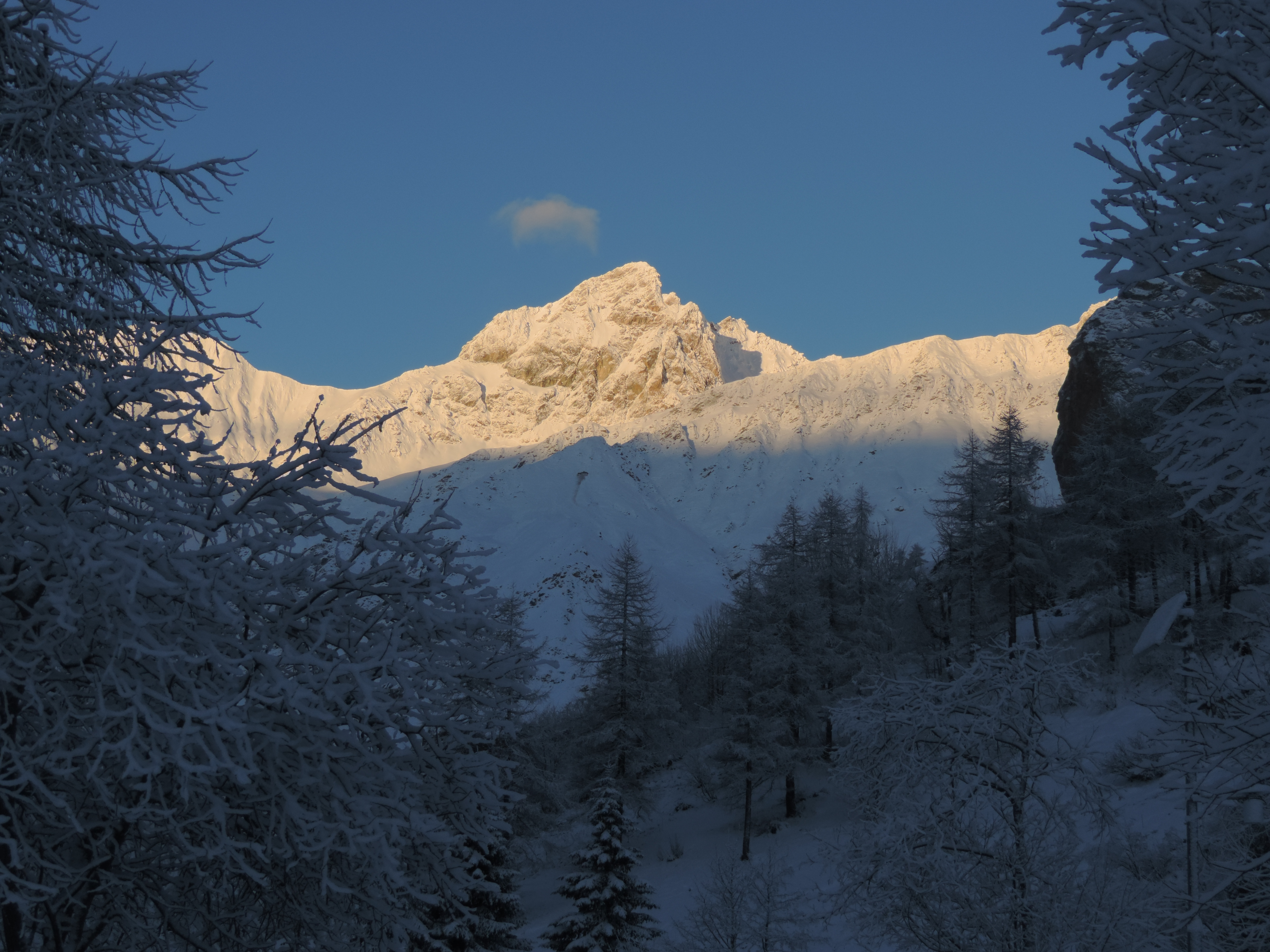 inverno 2014